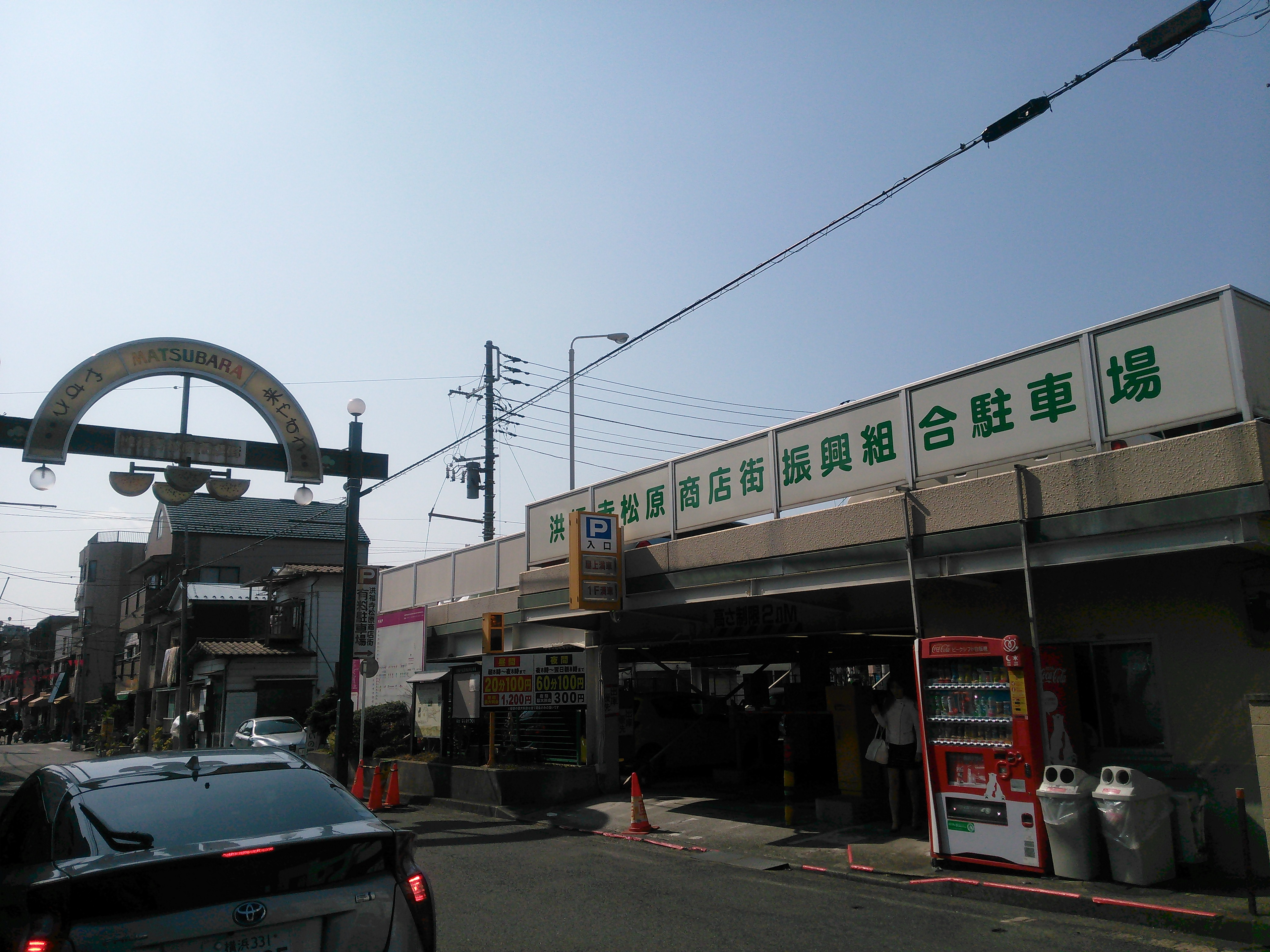 横浜市保土ケ谷区、洪福寺松原商店街の立体駐車場